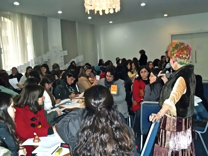 Educadora Esther Pillar Grossi ministra módulo para alunas do GEEMPA, organização que preside em Porto Alegre/RS.